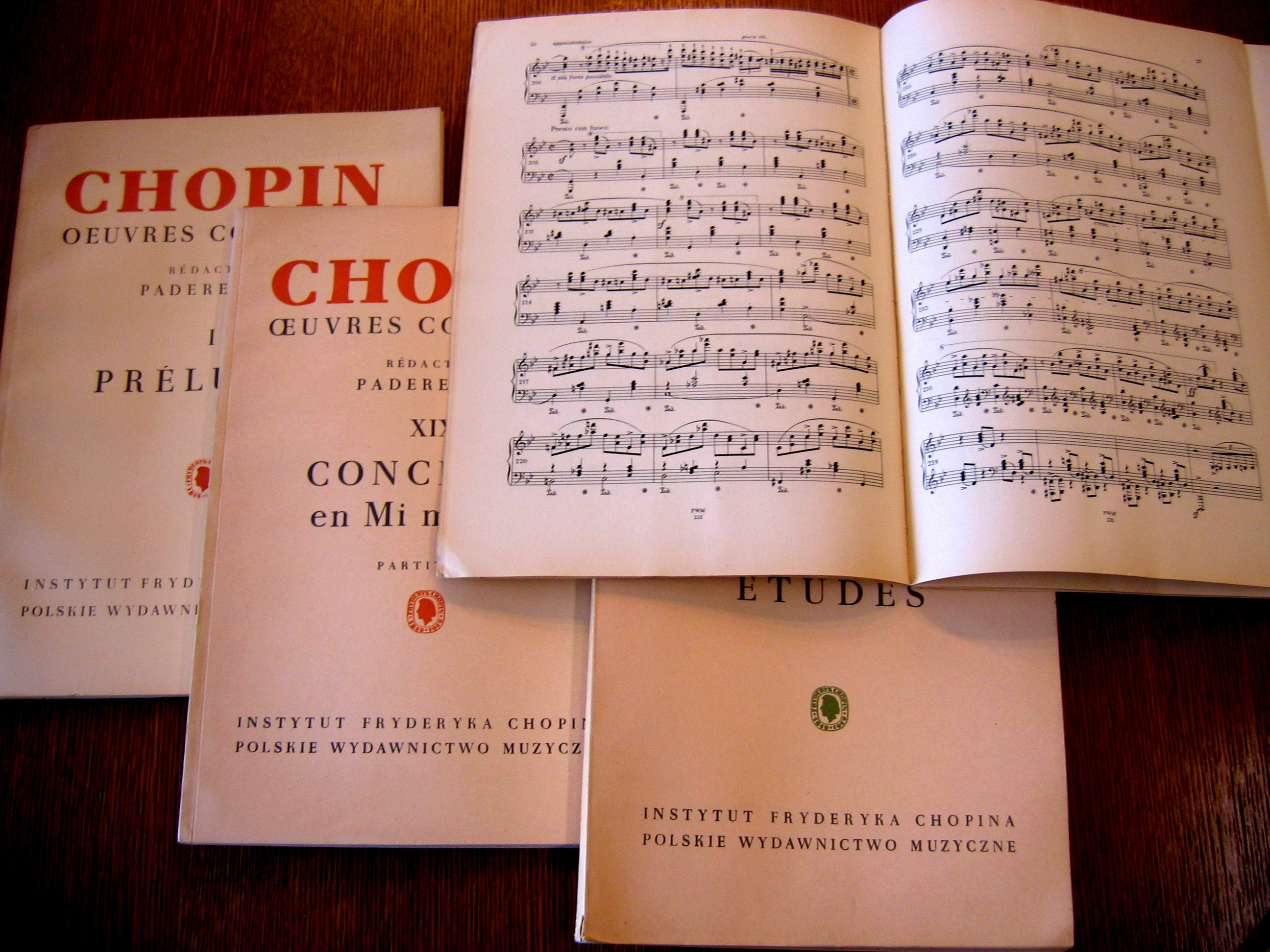 Quelques tomes de l'Édition Paderewski des Œuvres de Chopin